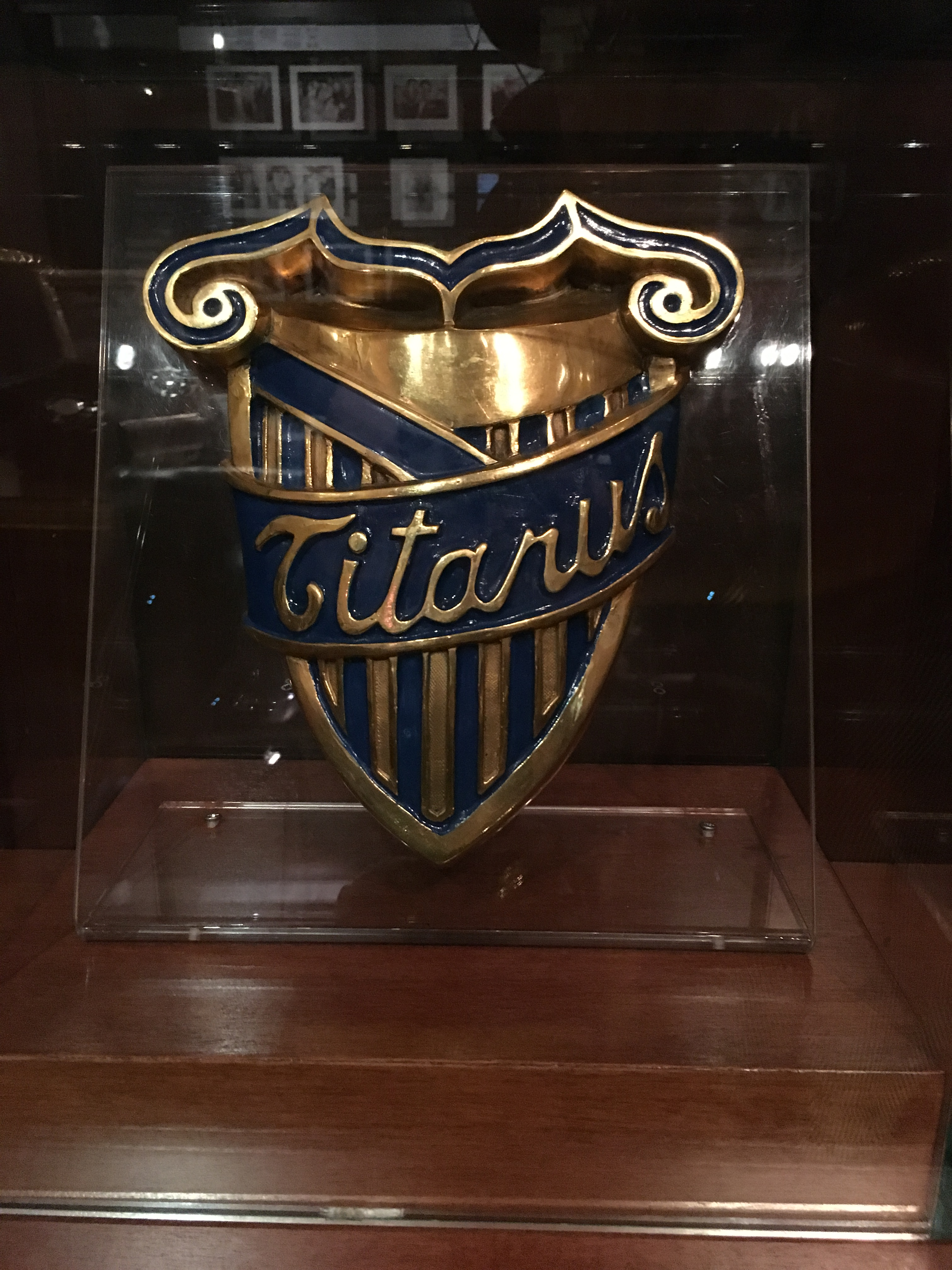 Simbolo Titanus. Museo del Cinema di Torino